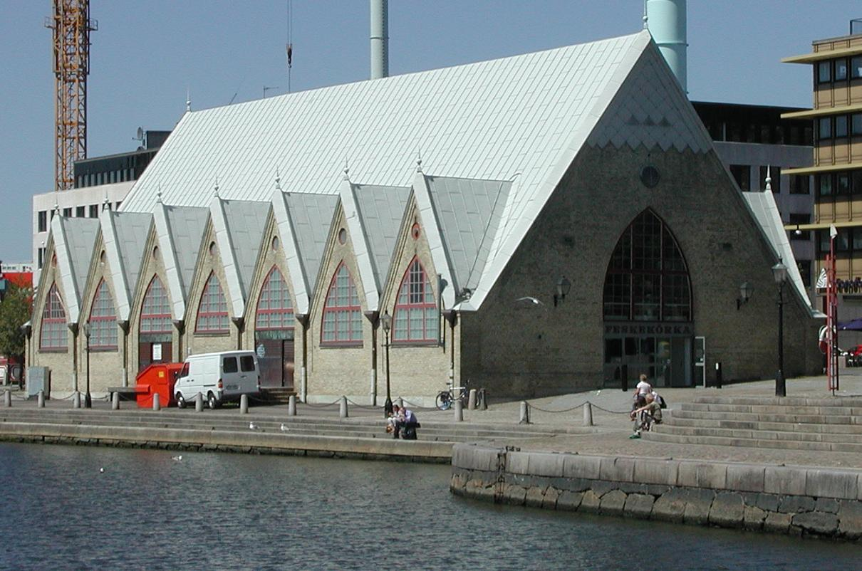 Feskekörka, Göteborg Datum: 2004-06-01